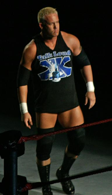 Mr. Kennedy (Ken Anderson)